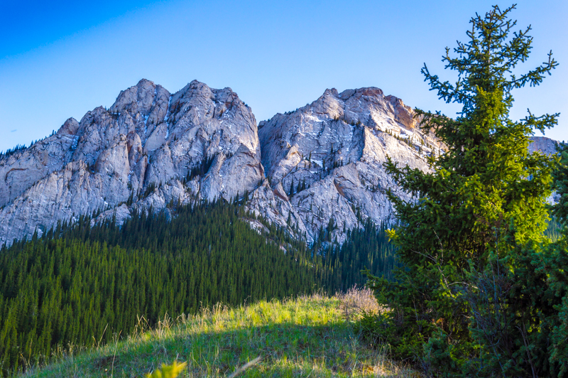 Ущелье Комирши. Казахстан.